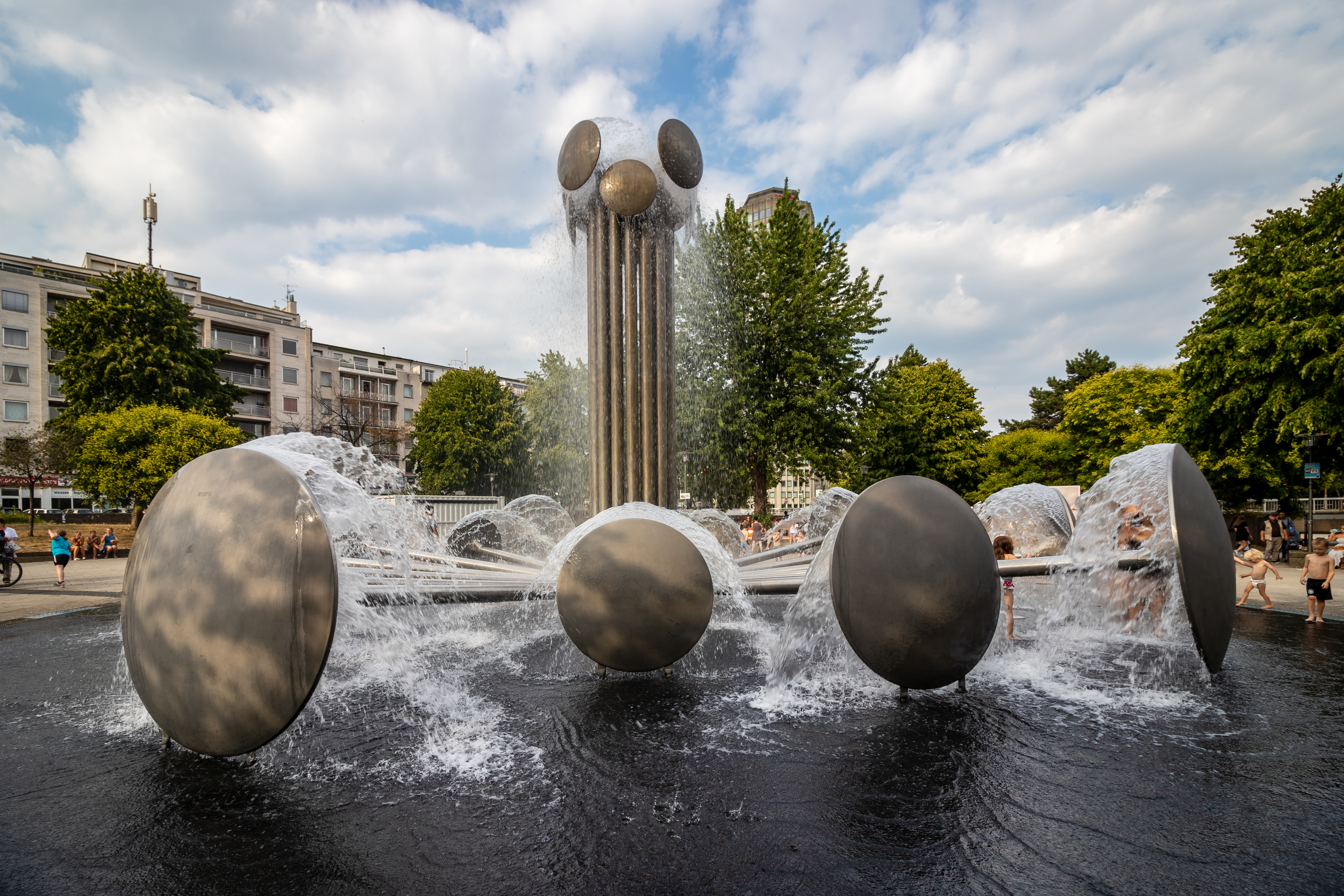 Wasserkinetische Plastik von Wolfgang Gödderz auf dem Ebertplatz, in Betrieb